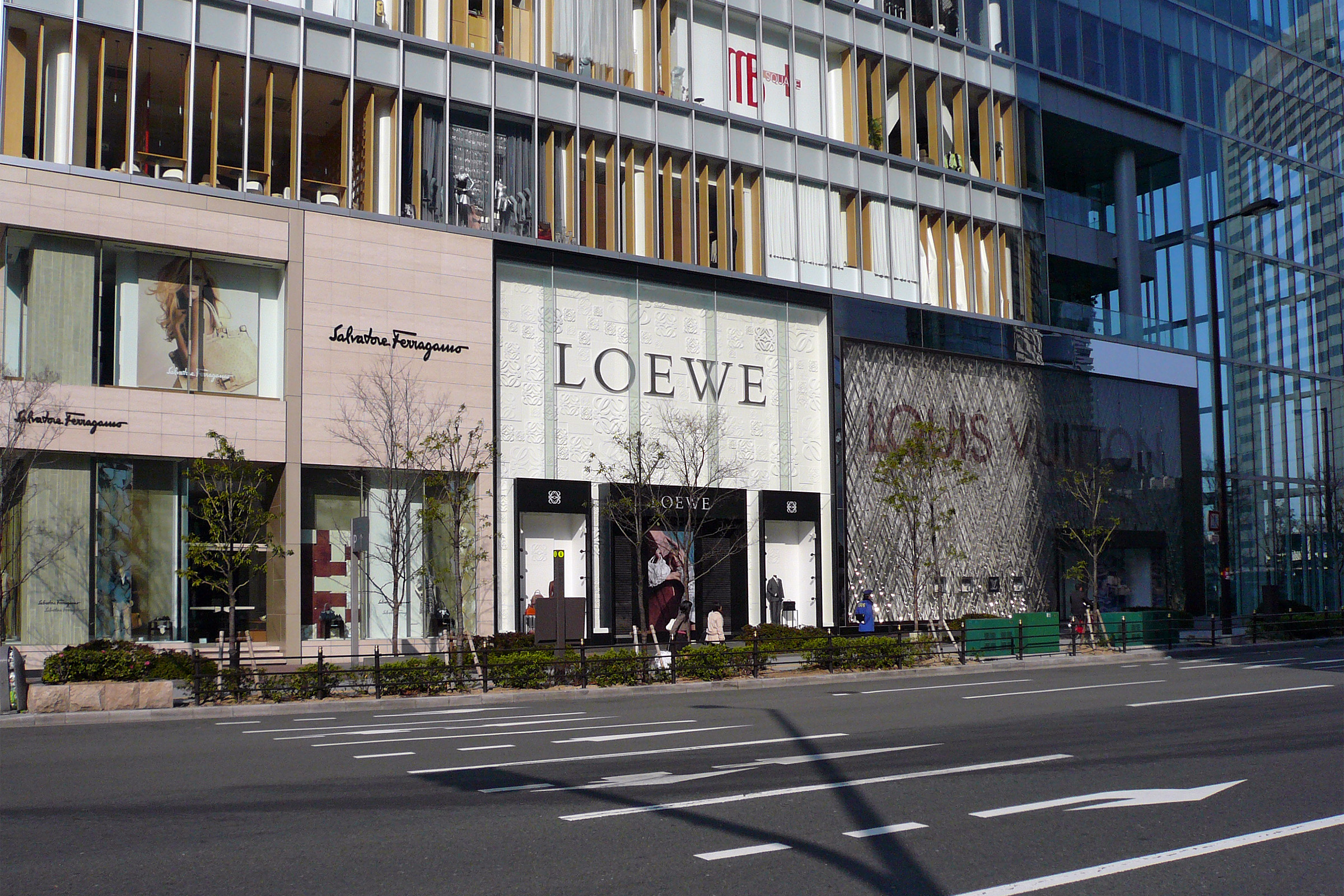 Hilton Plaza West in Osaka, Osaka prefecture, Japan